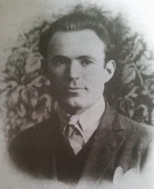 Ганчо Хаџи Панзов во 1924 година